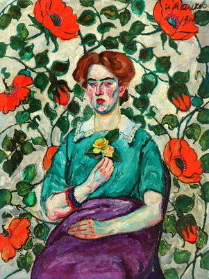 Холст, масло.